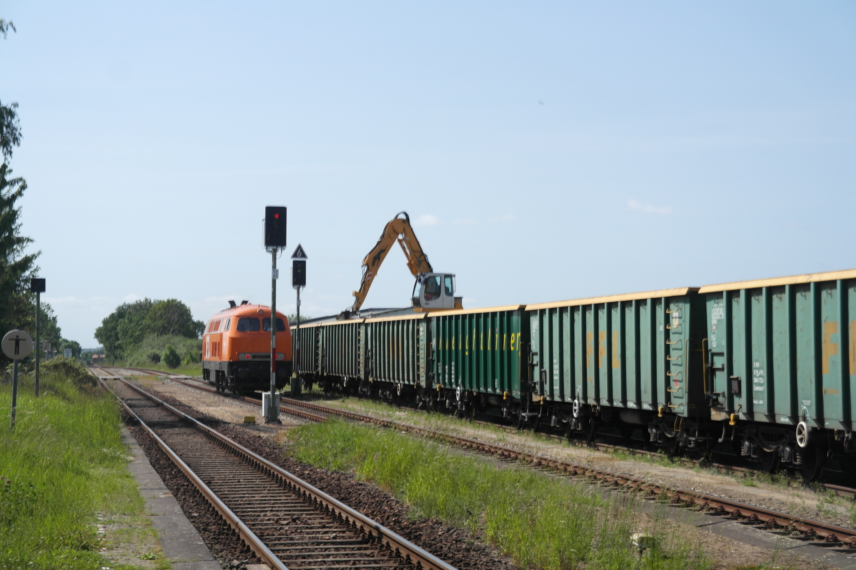 Oertzenhof, Gleise des Bahnhofs mit Güterzug